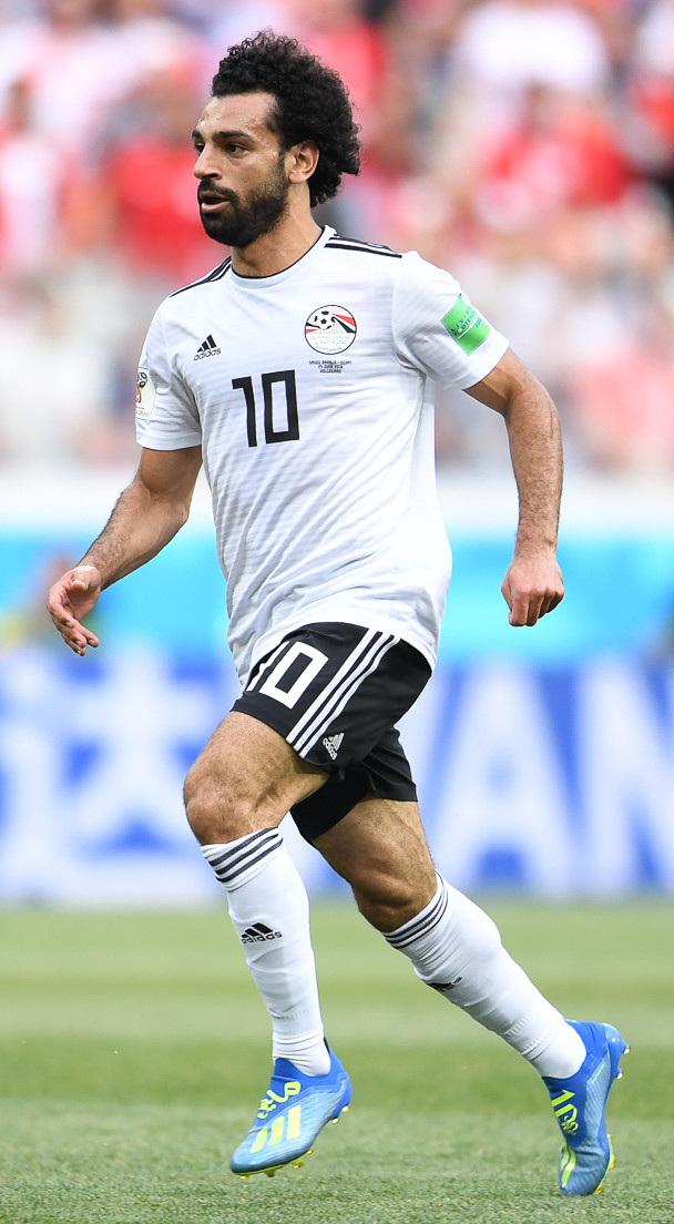 Египет с Салахом проиграл Саудовской Аравии